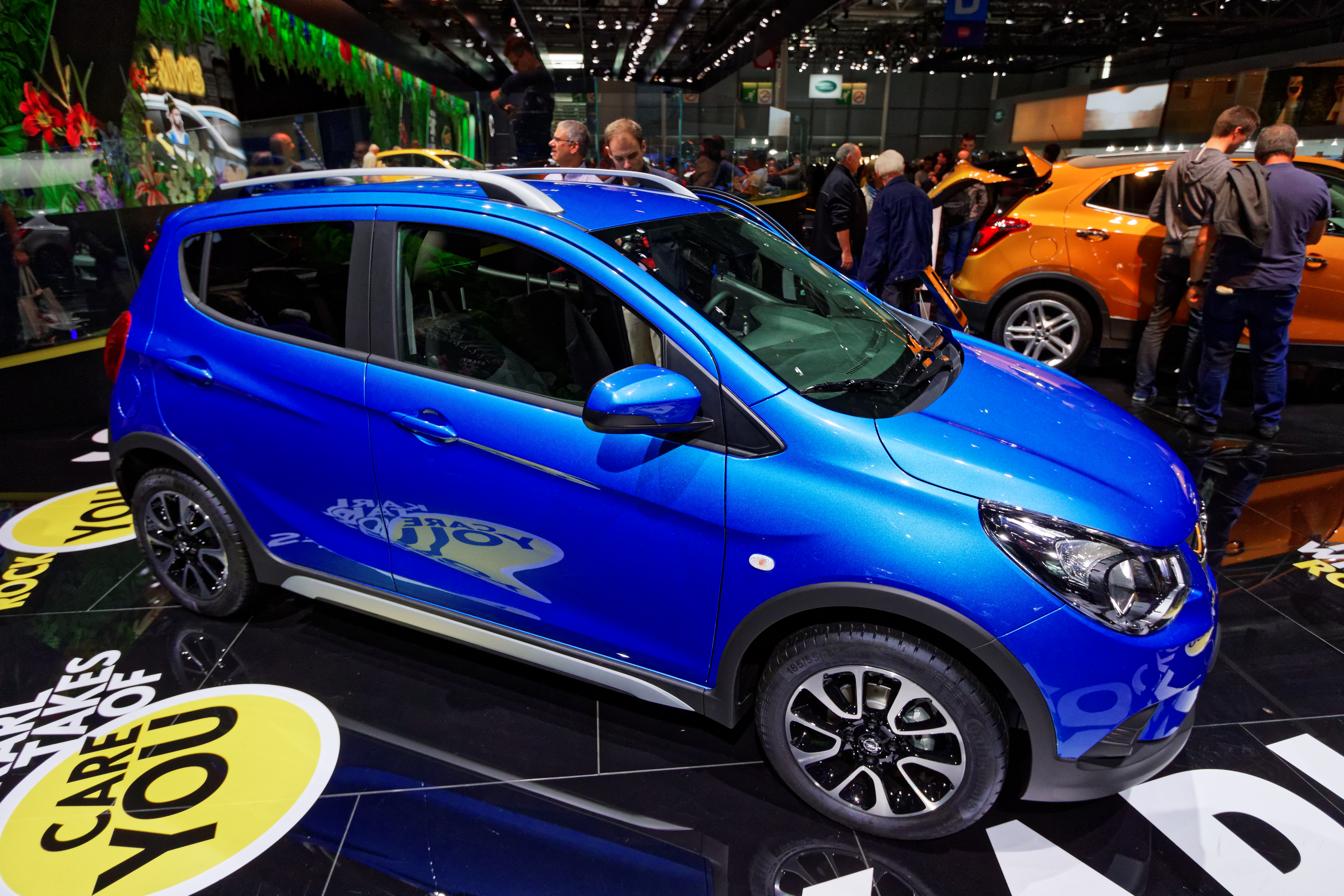 Une Opel Karl présentée lors du mondial de l'automobile de Paris 2016.